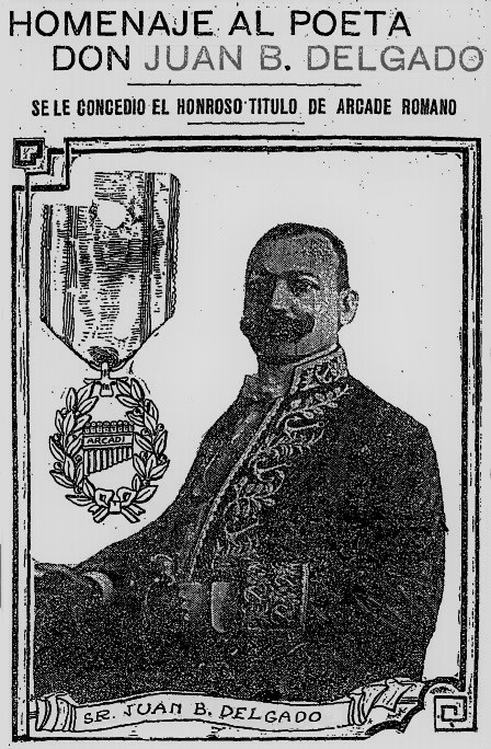 Homenaje al poeta Juan B. Delgado, por obtener el título de Arcade Romano, aparecido en el Diario -Periódico Nacional Independiente-, en la ciudad de México, el sábado 2 de julio de 1910.